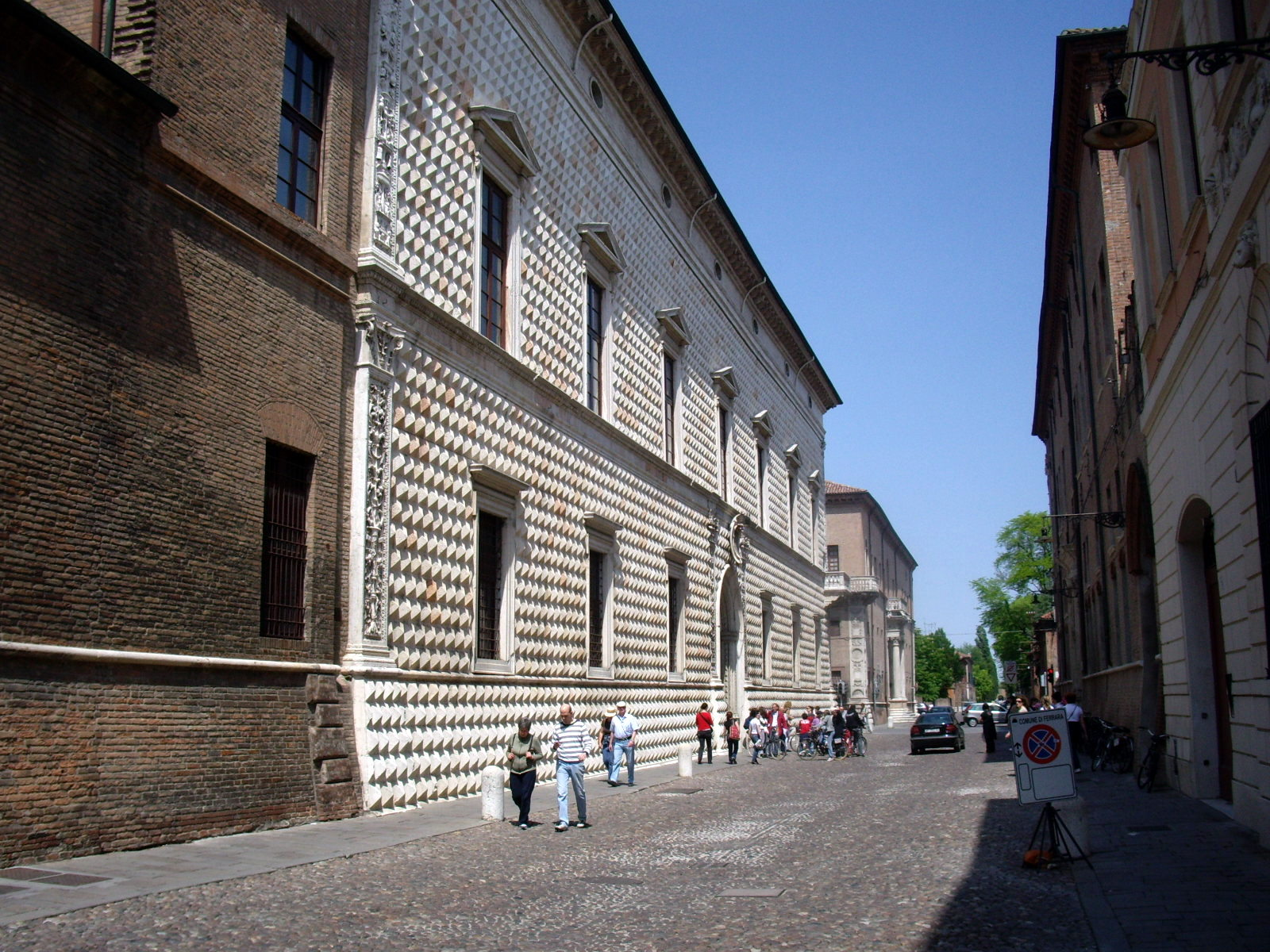 Fotografia del Palazzo Diamanti de Ferrara